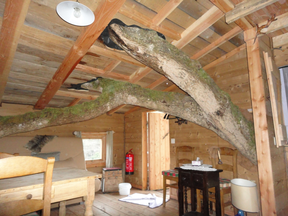 Intérieur la la cabane dans l'arbre, Moulin de Lisogne